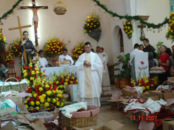 Bendicion del pan en Los Otates, Actopan.